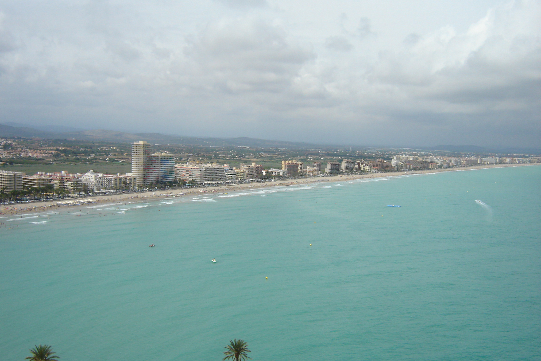 Blick von der Burg auf Peniscola